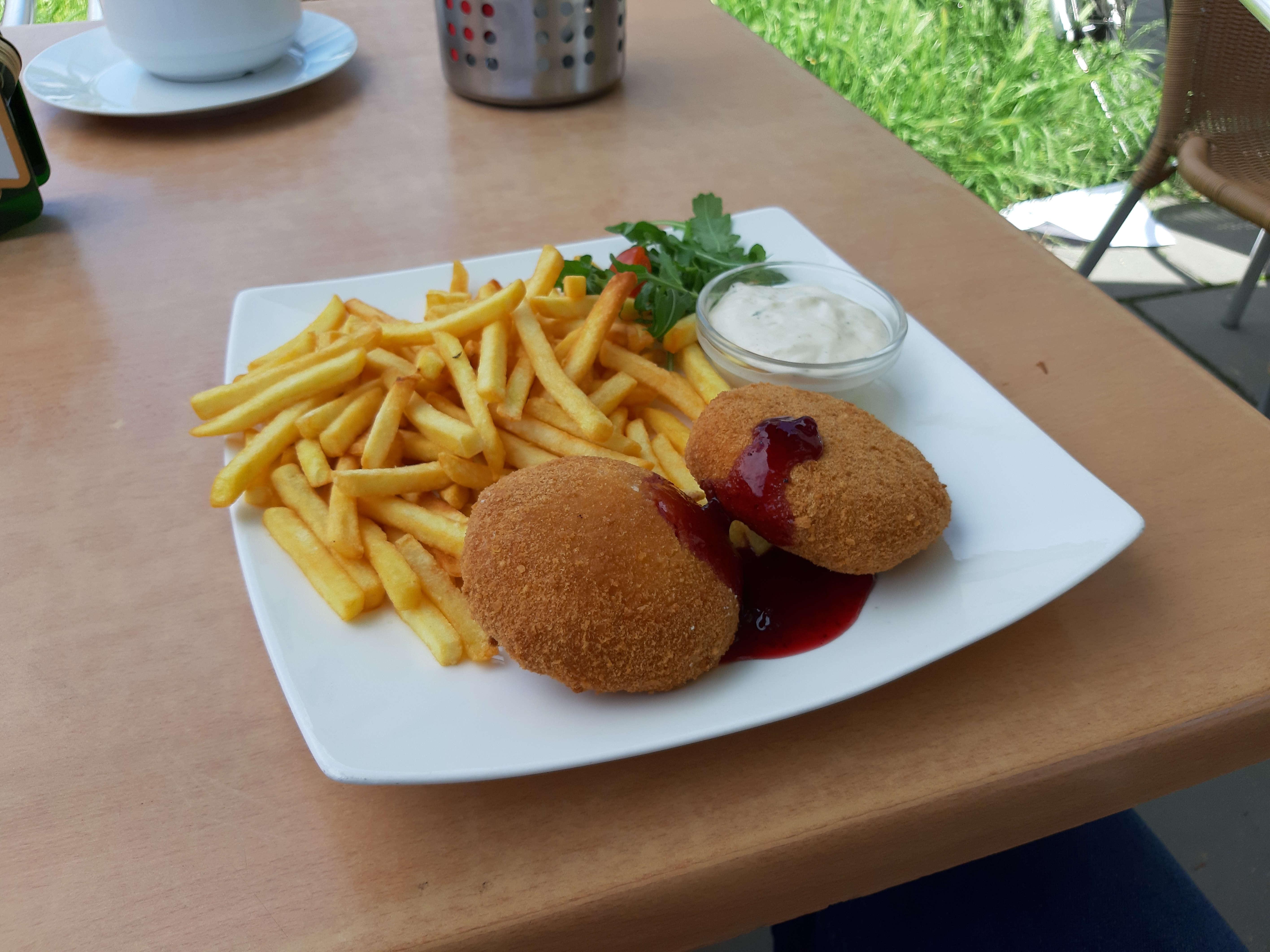 Smažený sýr - pokrm zakoupen v hospodě v Olomouci.